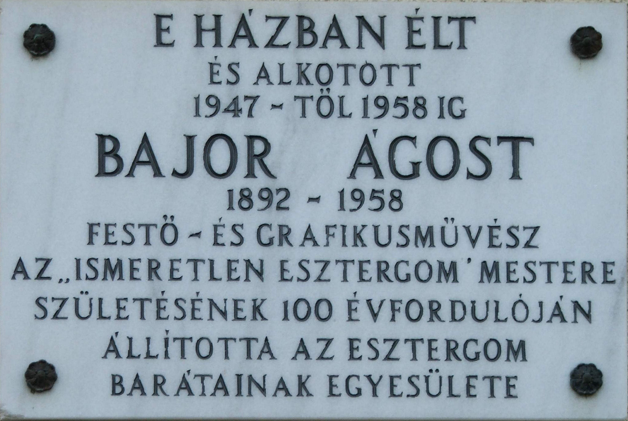 Bajor Ágost születésének 100. évfordulójára emléktáblát avattak egykori házán Malonyai és a Petőfi utcák sarkán (wiki)